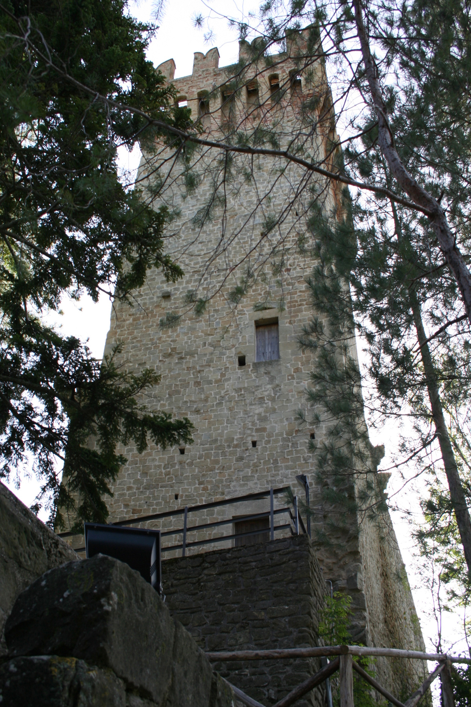 Mastio della Rocca di Arquata del Tronto, in provincia di Ascoli Piceno.